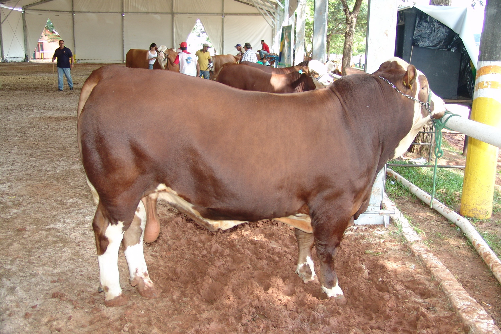 Animais em julgamento durante a 44º EMAPA, Avaré, São Paulo, Brasil